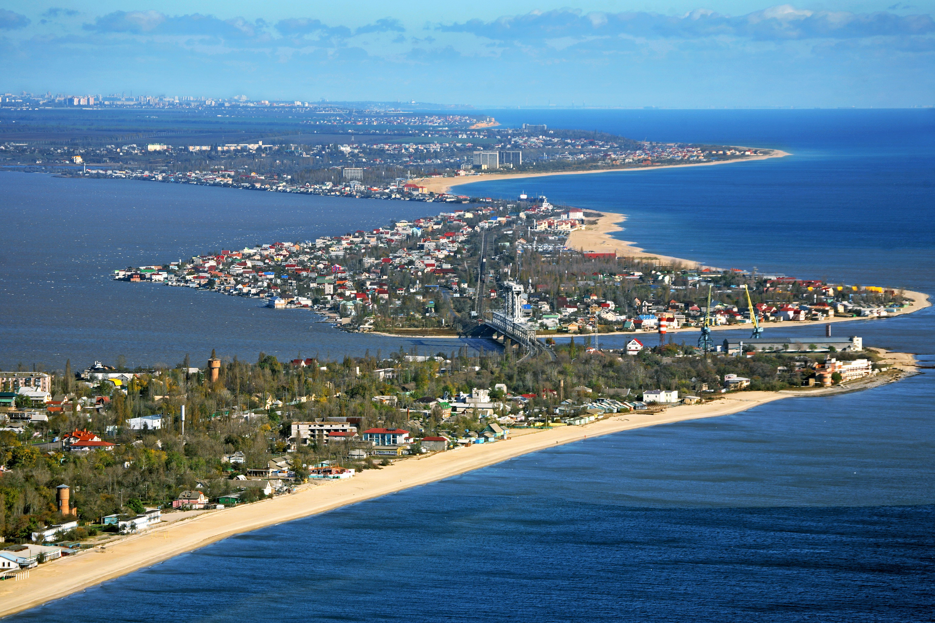 ZATOKA